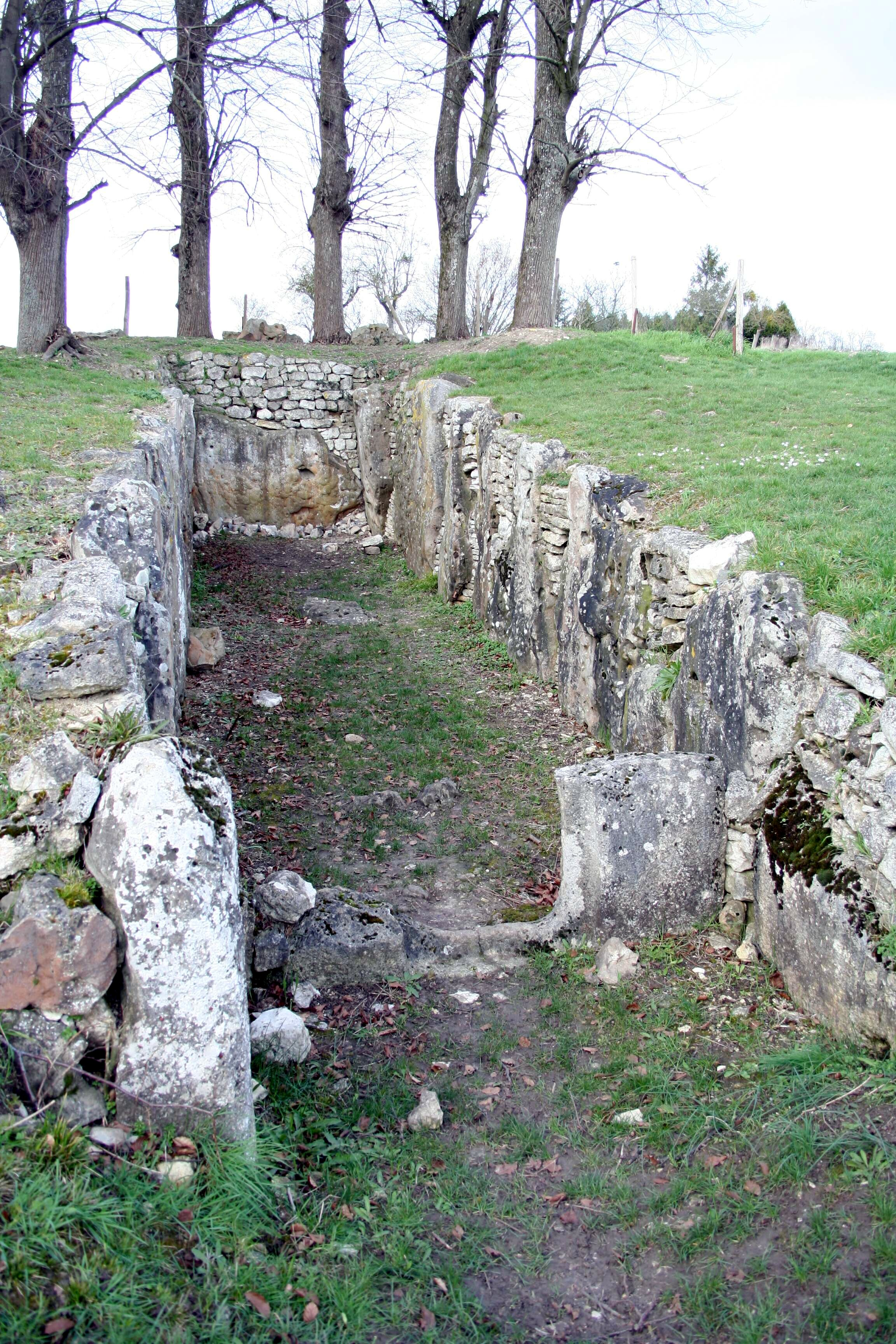 La Cave aux Fées à Brueil-en-Vexin - Yvelines (France), vestiges d'une allée couverte de l'époque néolithique.